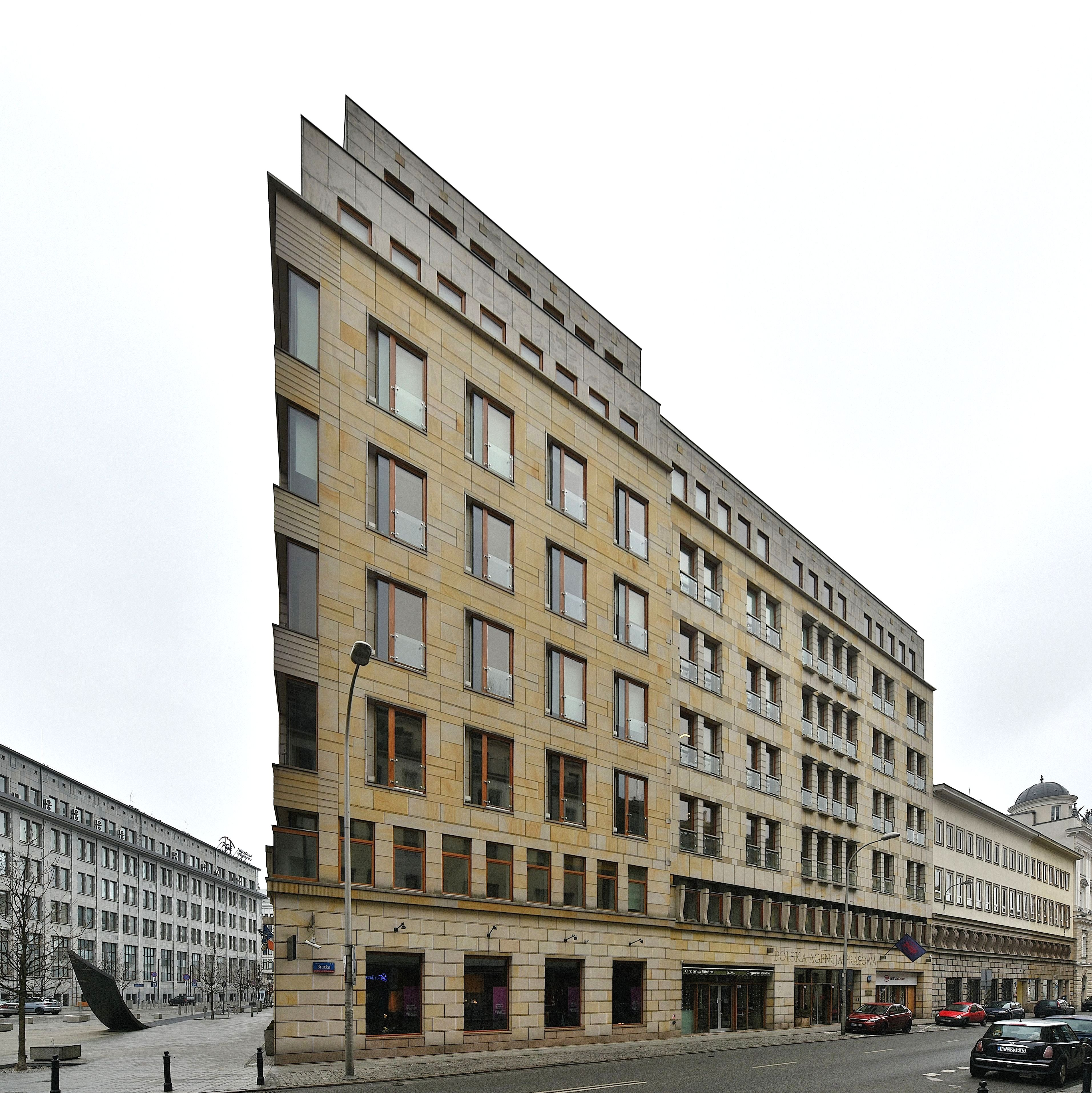 Biurowiec Liberty Corner przy ul. Mysiej róg Brackiej w Warszawie